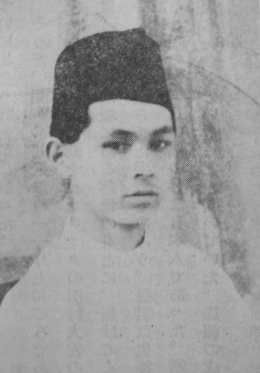 ソンコクを被った谷。